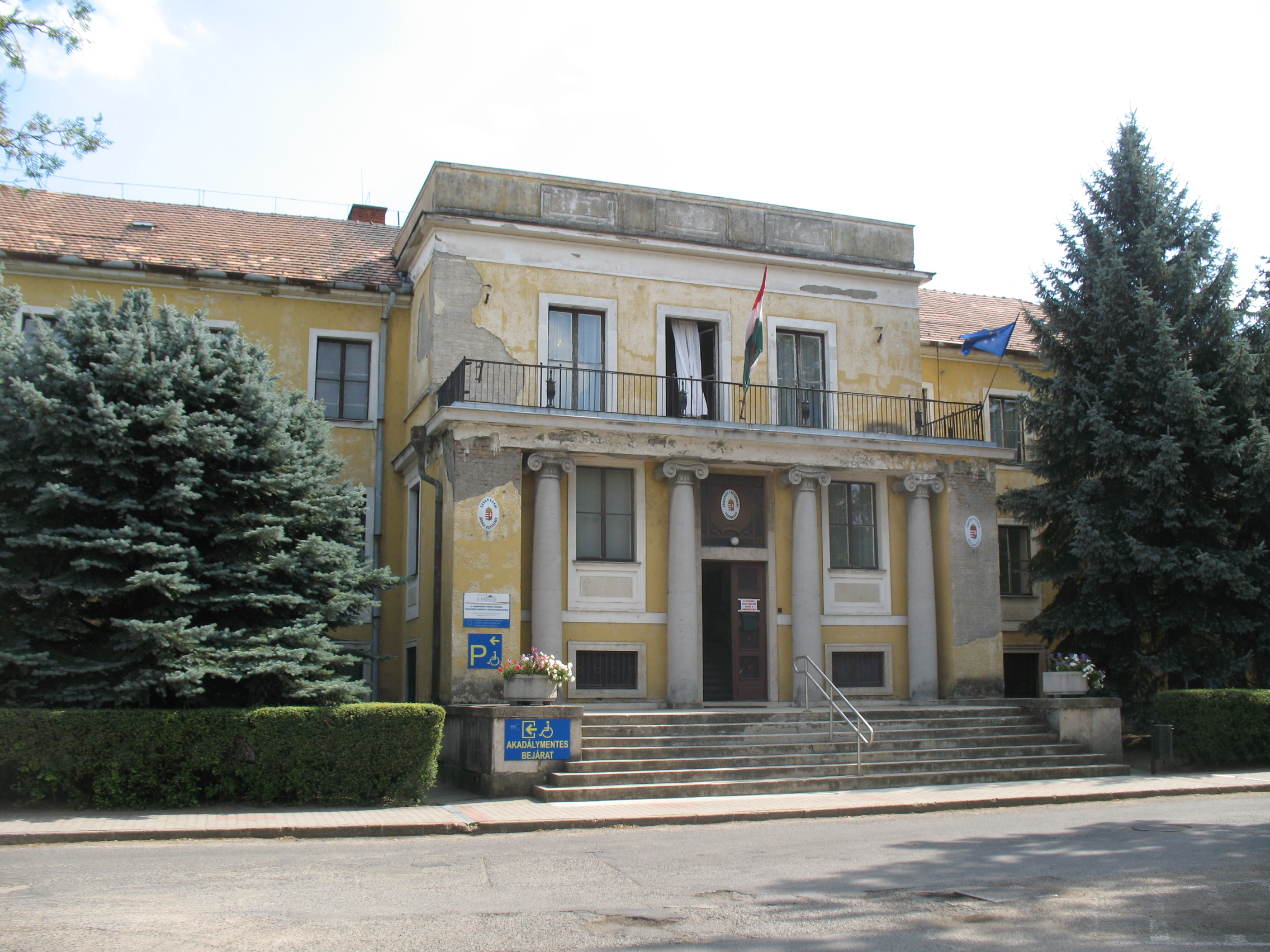 Sárbogárdi Városi Ügyészség - Sárbogárdi Járásbíróság- Cím: 7000 Sárbogárd, Hősök tere 17